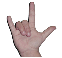 アメリカ手話で「I Love You」